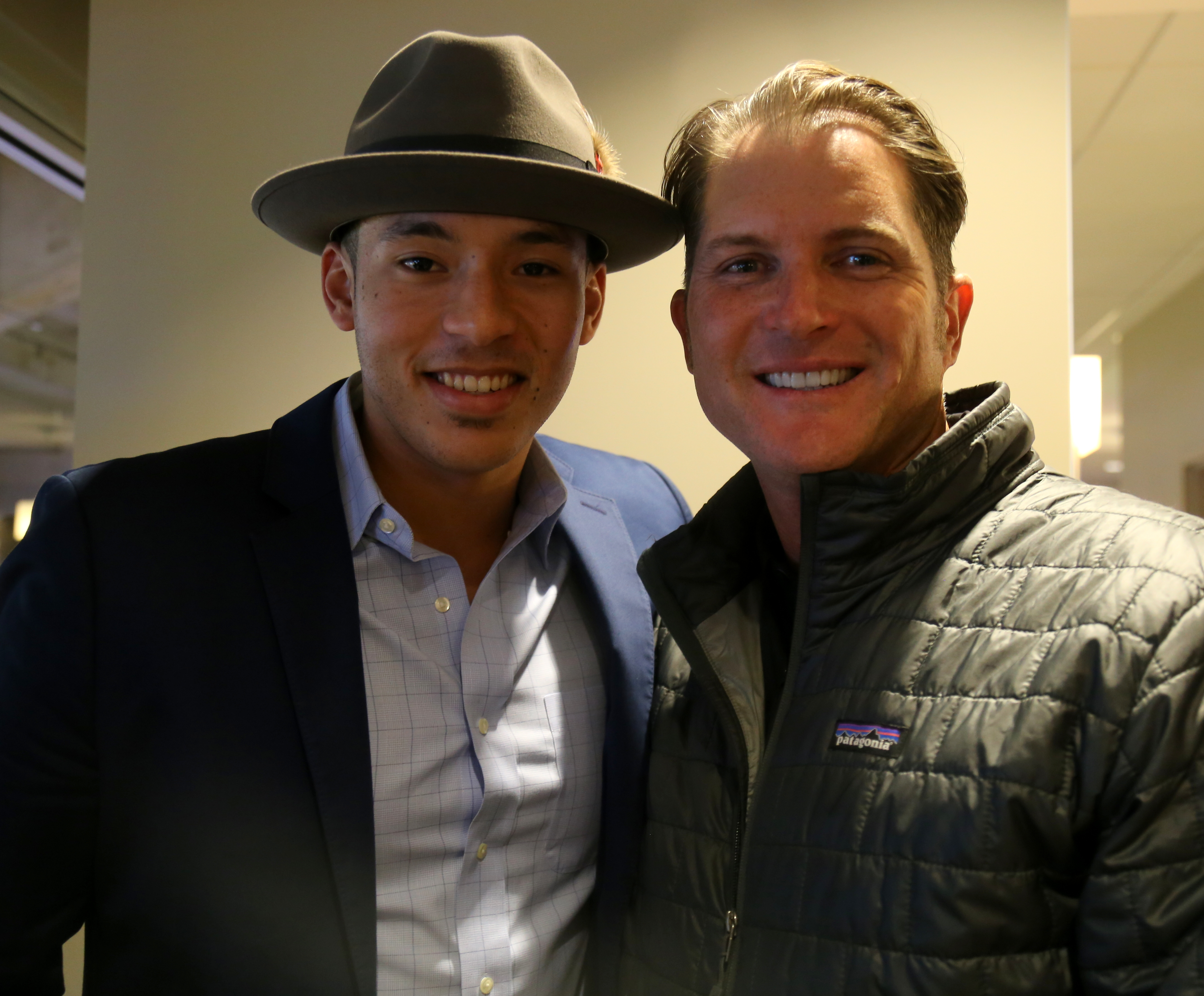 Carlos Correa meets Royals legend Mike Sweeney.